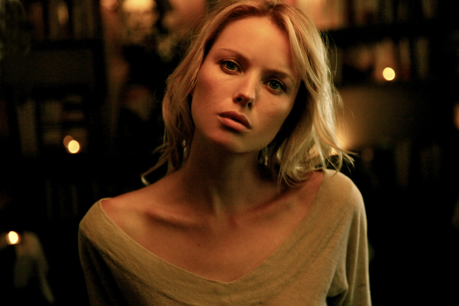 Sophie Meister by Julian Torres